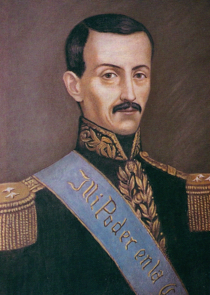 Cuadro del Gral. José María Urbina Viteri, de la Galería de Presidentes de la República del Ecuador.